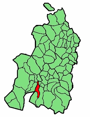 aipaturiko udalerriaren kokapena Nafarroa Beherean